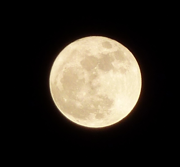 Foto da superlúa do 2011 dende O Burgo, Culleredo.